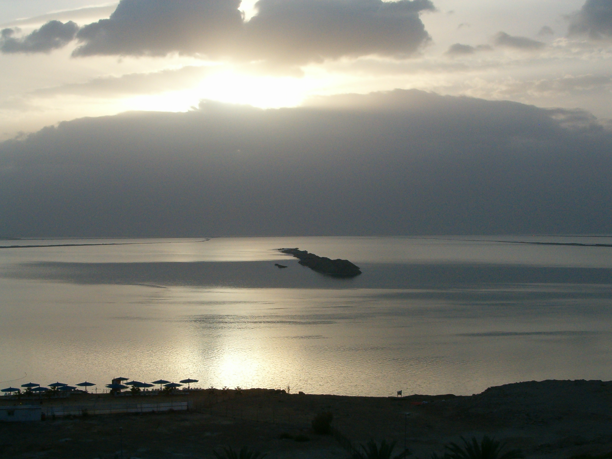 זריחה בים המלח ליד עין בוקק